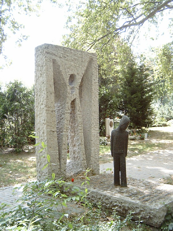 Kosztolányi Dezső sírja Budapesten, Kerepesi temető: 42-1-98. Ősze András (*1909) szobrászművész alkotása (1986)